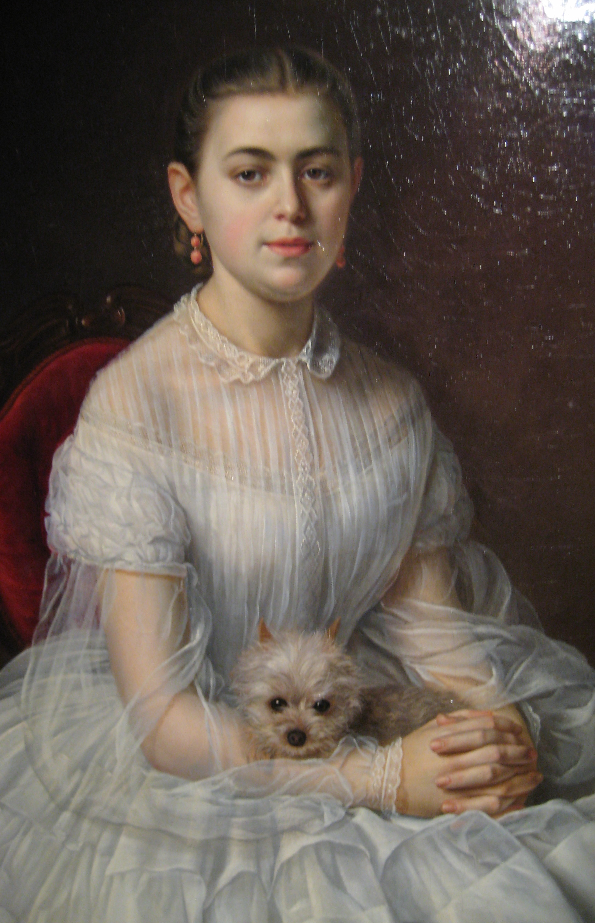 Выставка "Национальная портретная галерея", 2012.